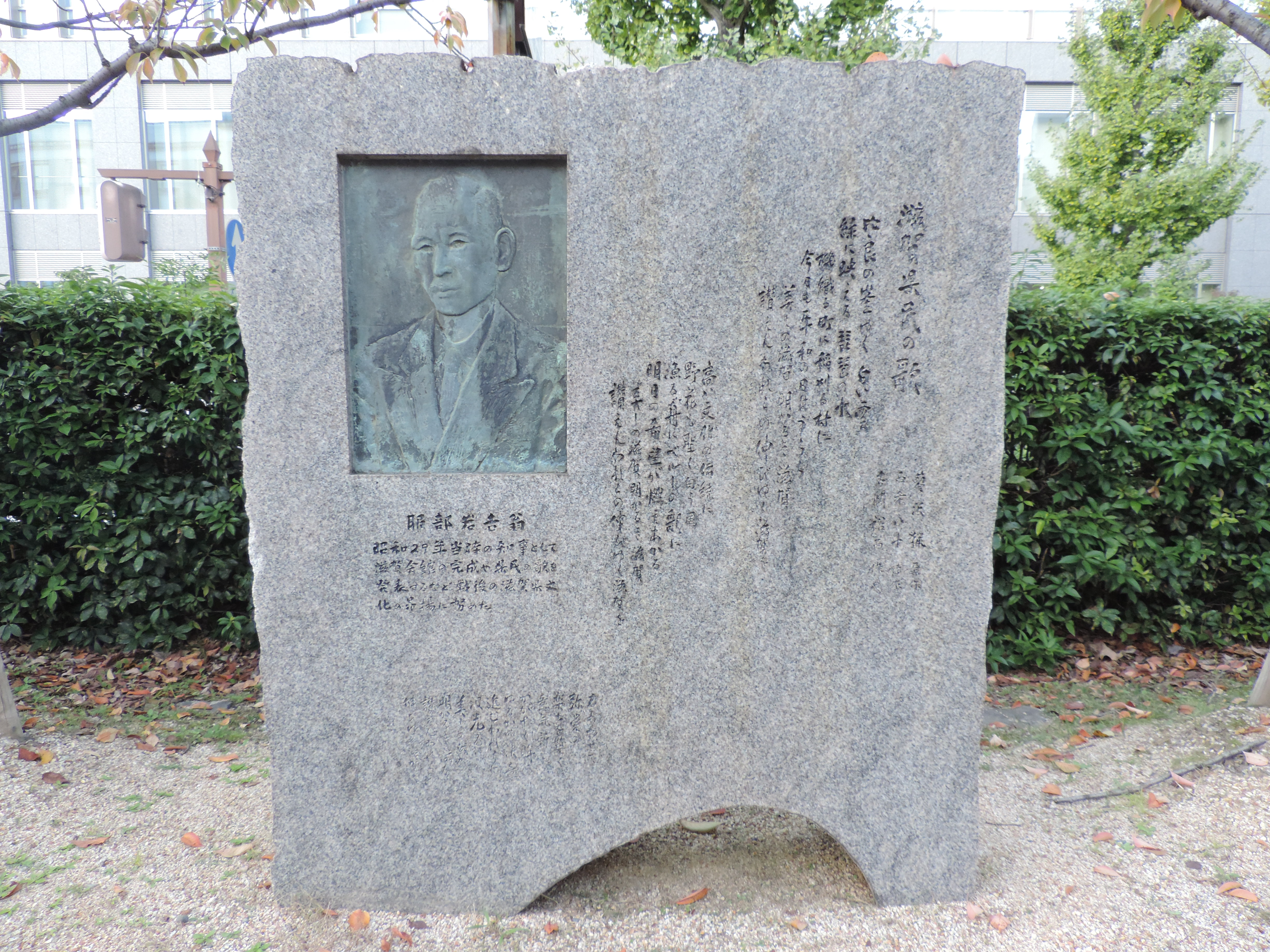 滋賀県庁に位置する「滋賀県民の歌」の石碑。2017年撮影